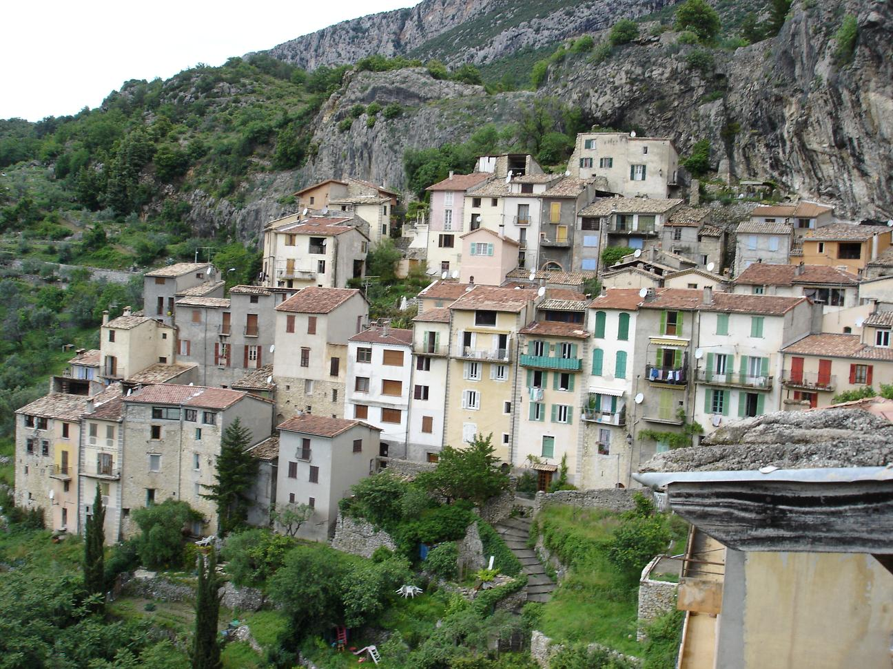 Vue de Sigale